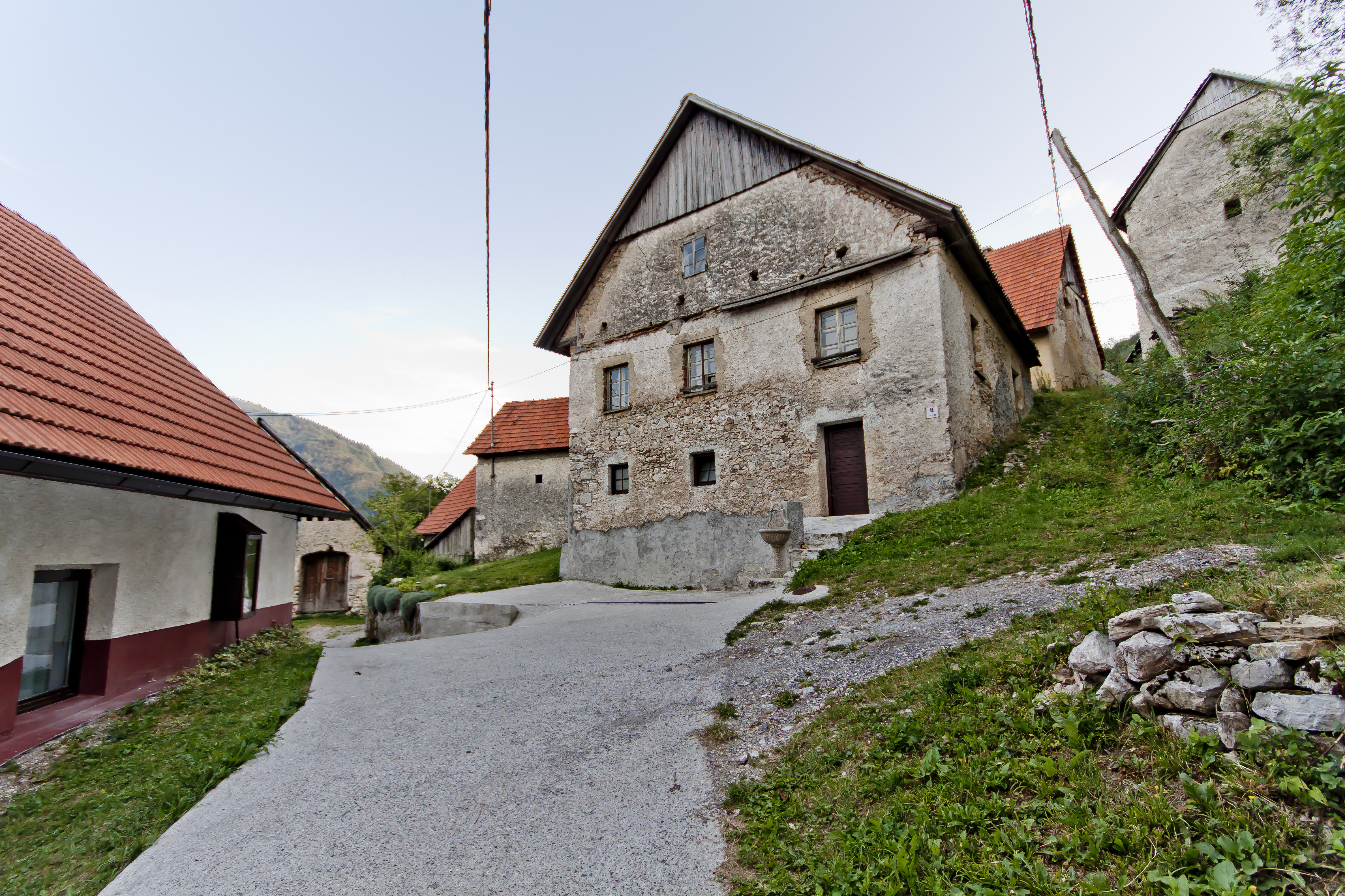 Znojile